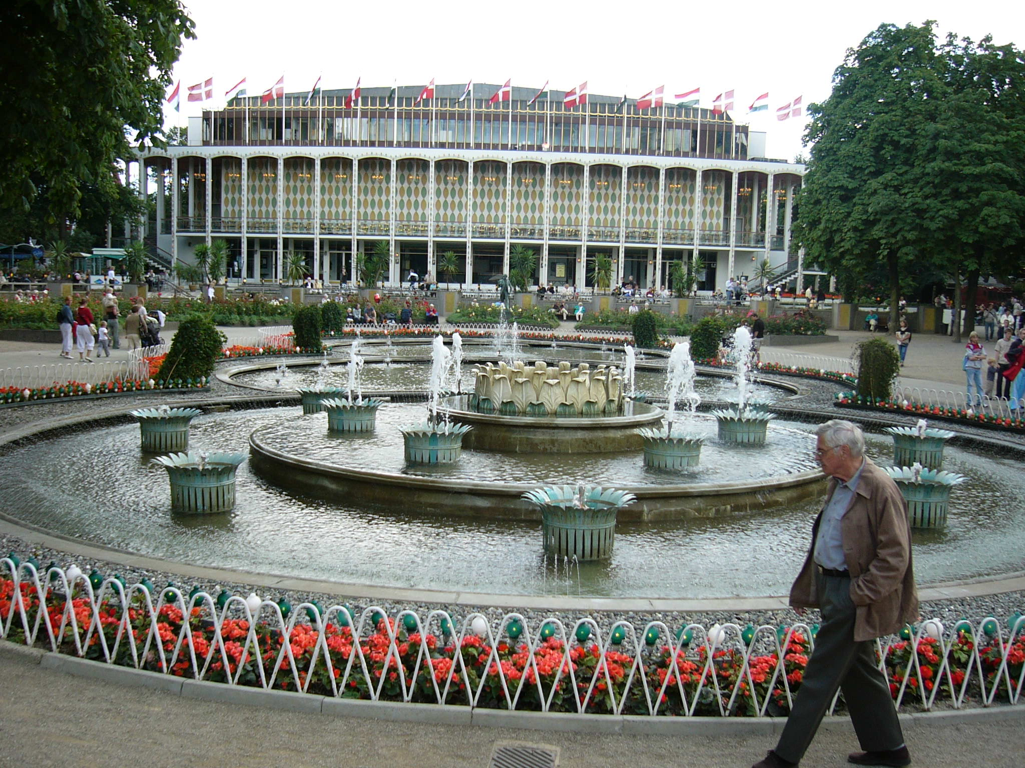 Sala de Concertos do Tivoli, Copenhague